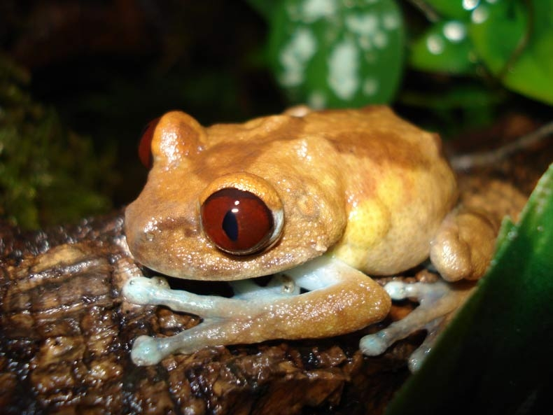 pregnant female Leptopelis uluguruensis